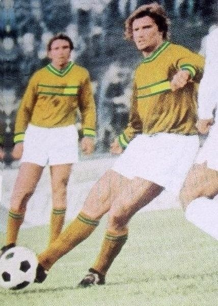 Henri Michel en 1971 'Ageducatifs football 1971 - 1972', Panini figurina n°55.